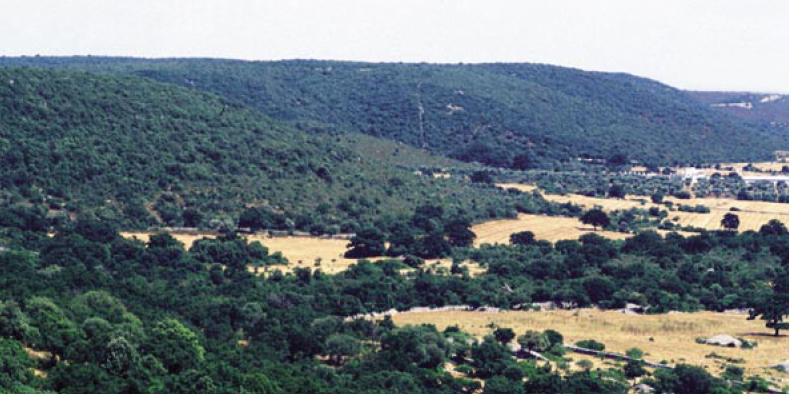 Murgia Sud Orientale gradino